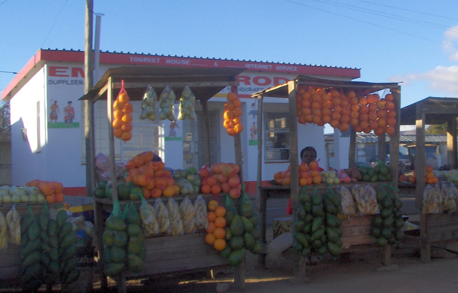 Swaziland fruit stand